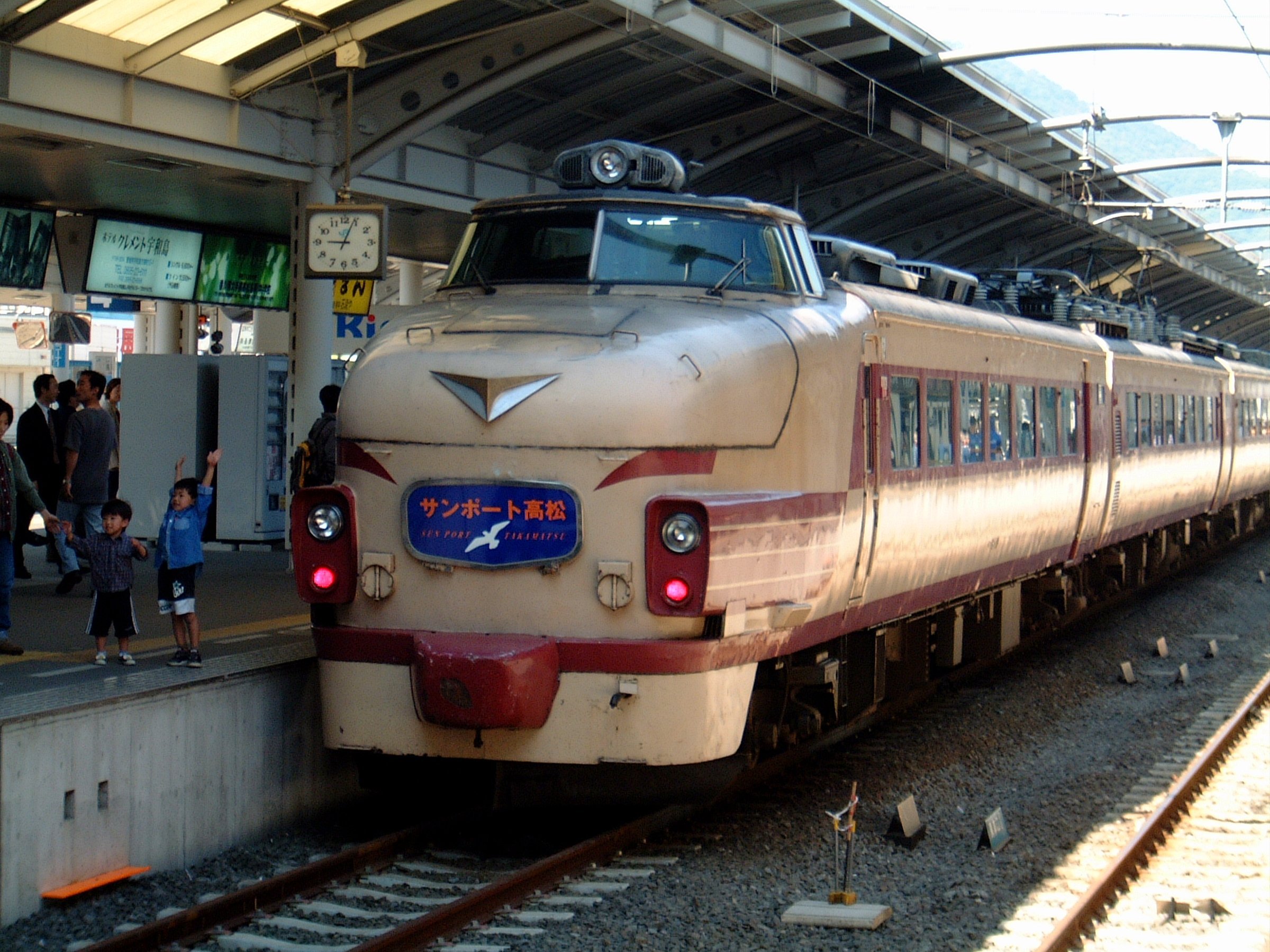 臨時特急 「サンポート高松号」